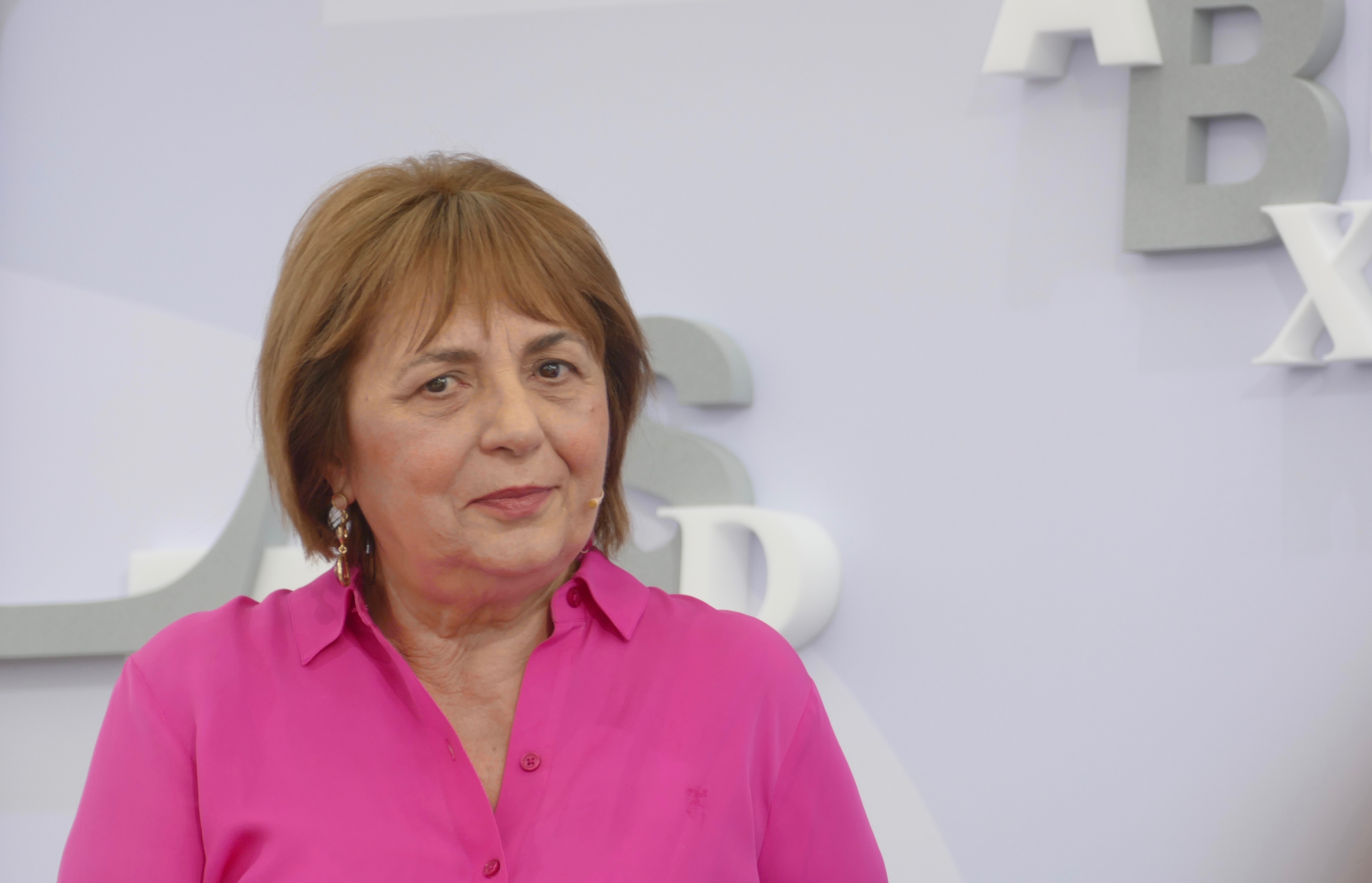 Gabriela Adameșteanu auf dem "Blauen Sofa" bei der Leipziger Buchmesse 2018